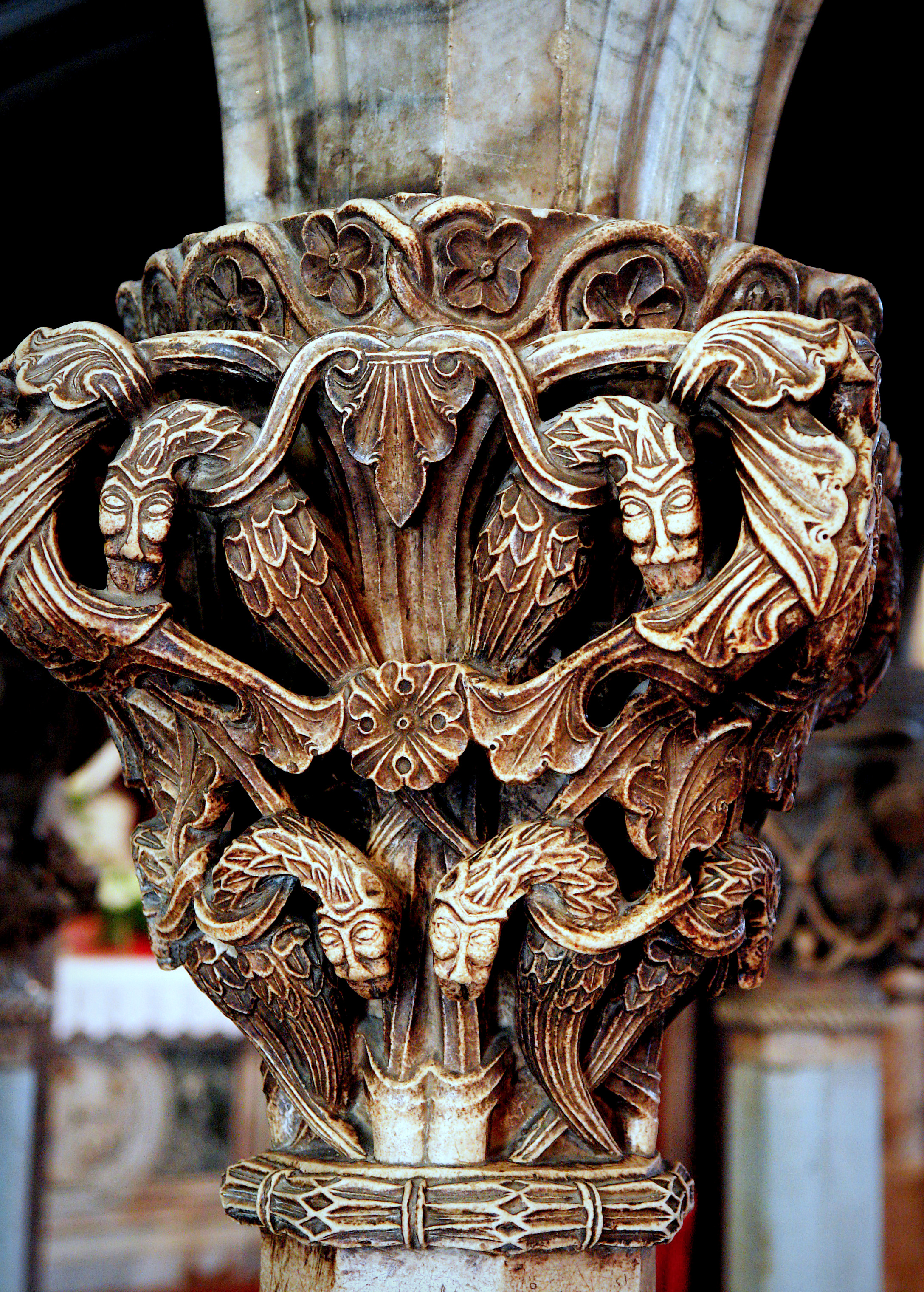 Szent Dujmo-székesegyház, Spalato (Split). Katedrala sv. Dujma u Splitu. Cathedral of Split.